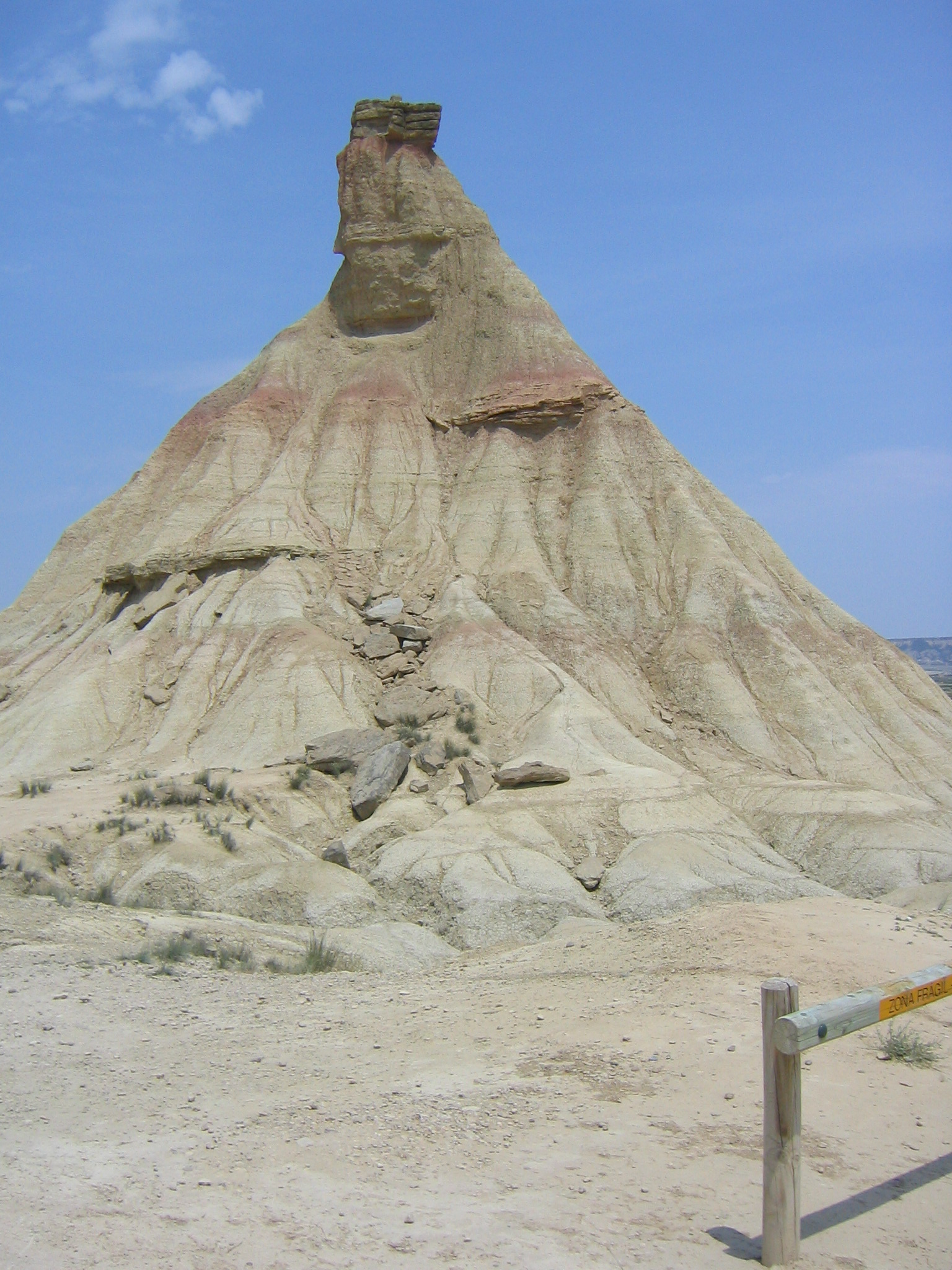 Paisaje de las Bardenas Reales de Navarra, cabezo Castildetierra.